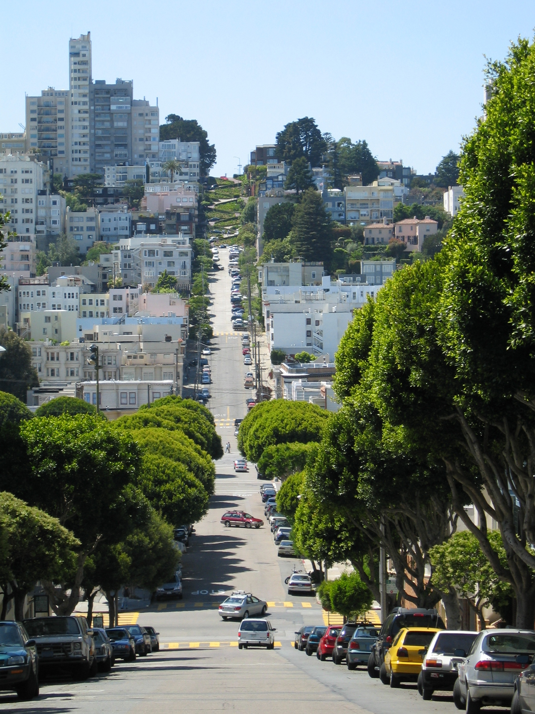 Lombard Street